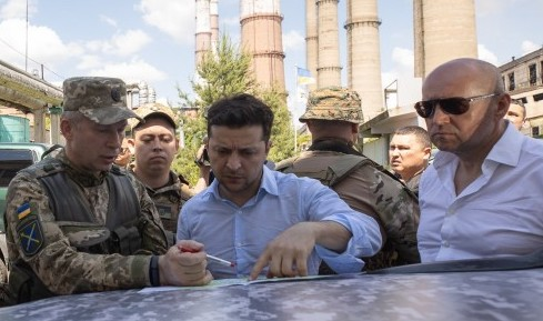 Президент України Володимир Зеленський відвідав передові позиції ЗСУ на Луганщині